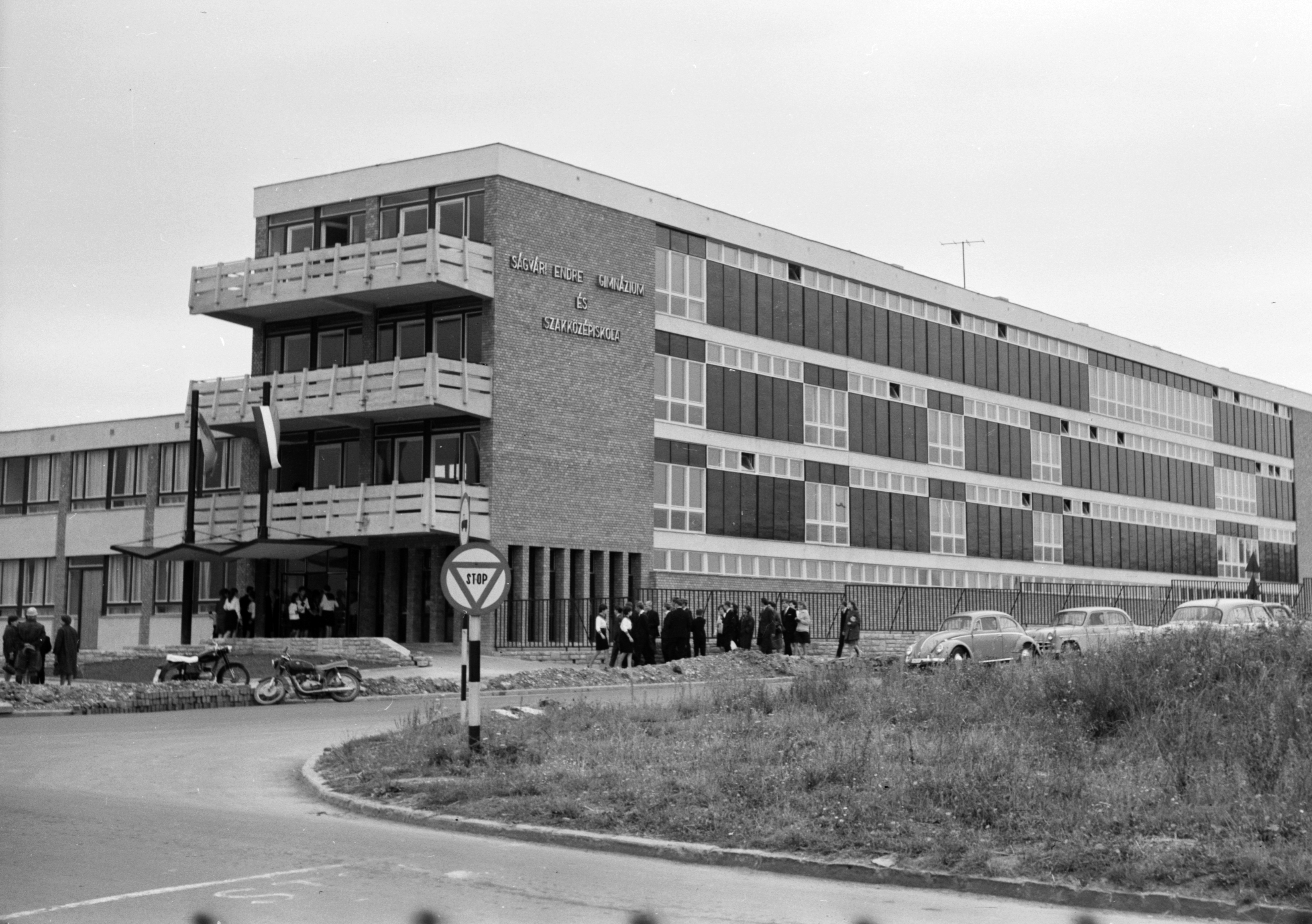 Jószerencsét út 2. Ságvári Endre Gimnázium és Szakközépiskola (ma Szalézi Szent Ferenc Gimnázium). Location: Hungary Tags: school, automobile, Gerrman brand, Volkswagen-brand, Volkswagen Beetle Title: Jószerencsét út 2. Ságvári Endre Gimnázium és Szakközépiskola (ma Szalézi Szent Ferenc Gimnázium).